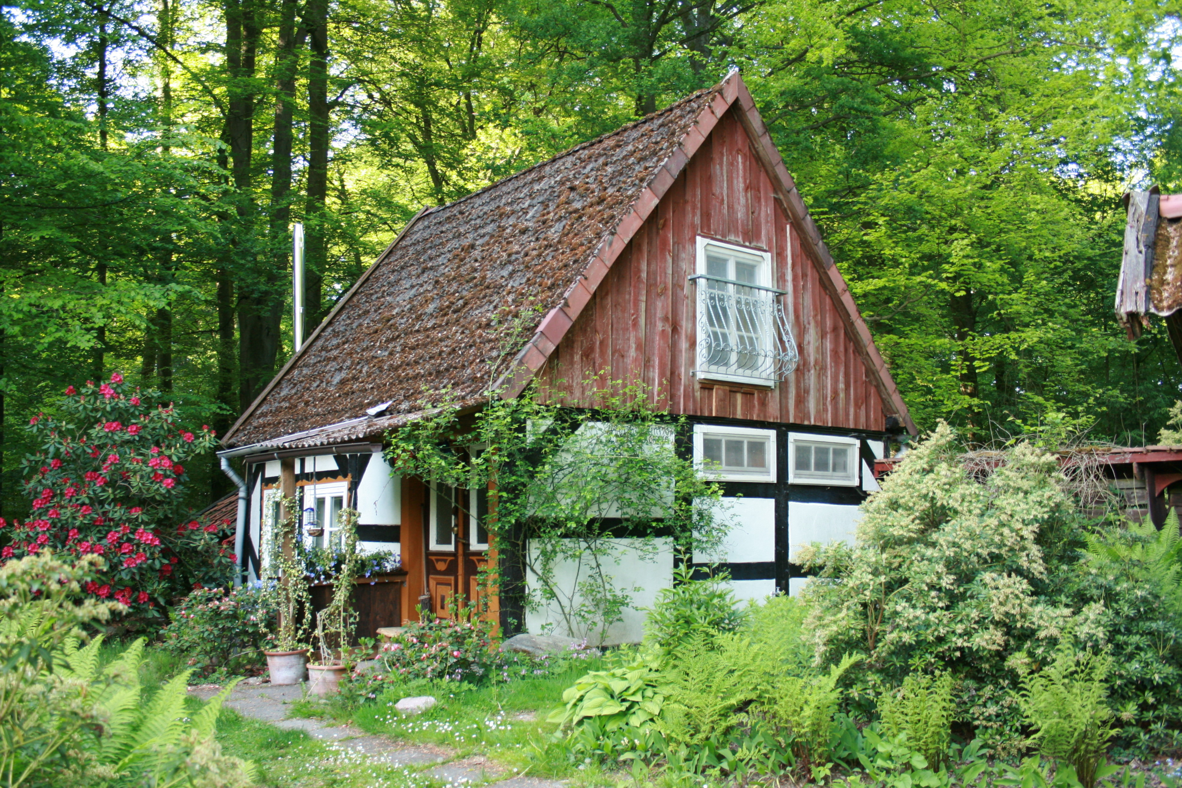 Hof Limbeck, Gilmerdingen in Neuenkirchen (Lüneburger Heide): Zum Ferienhaus umgebautes Backhaus